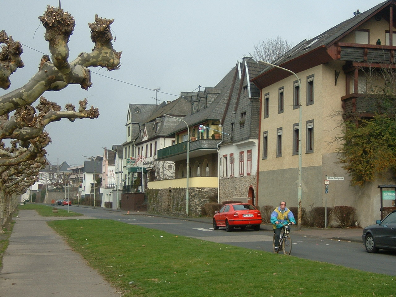 Rheinallee Leutesdorf 2 F.Lang Eigenes Bild 20.02.07